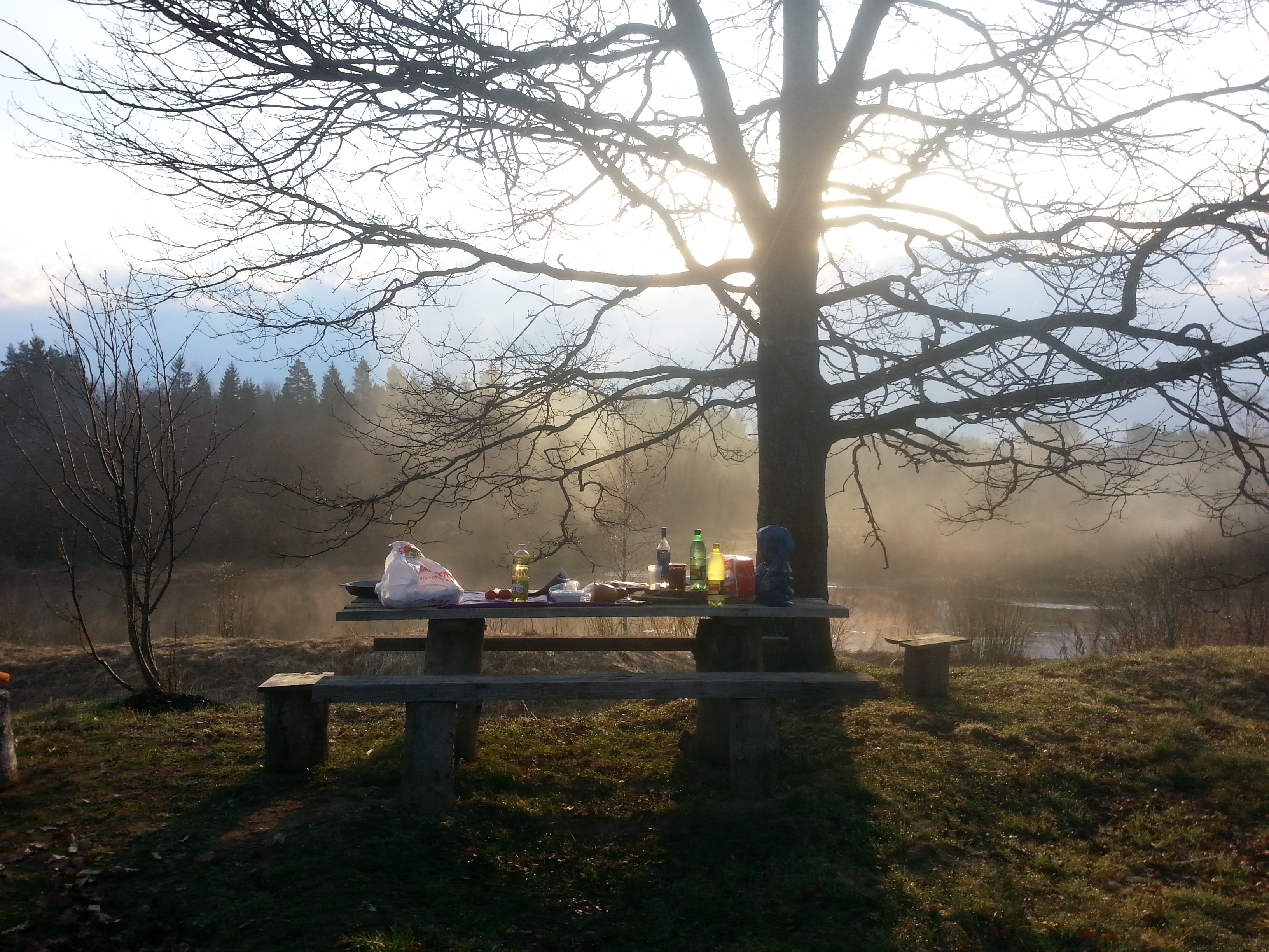 Вид на реку Осьма